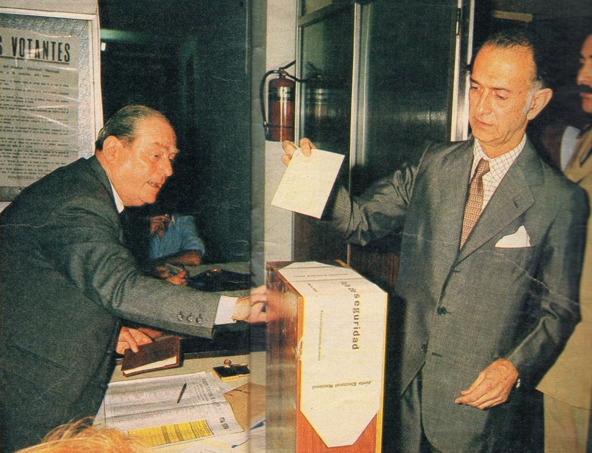 José Alfredo Martínez de Hoz votando en las elecciones presidenciales de Argentina de 1983.